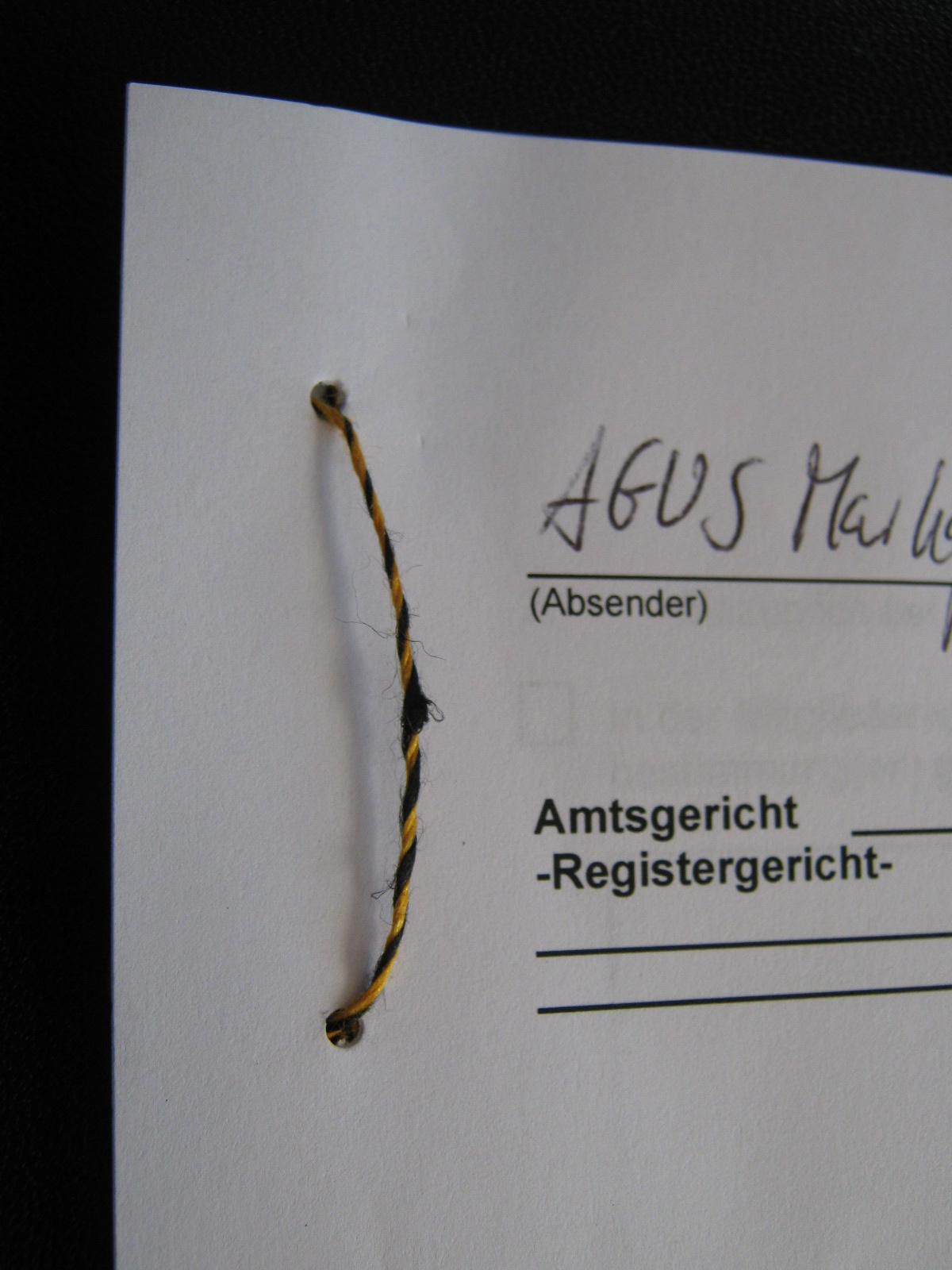 Foto als Beispiel für eine «Badische Lochung» an einem mit einer Dokumentschnur zusammengehaltenen Dokument mit notariell beglaubigter Unterschrift.